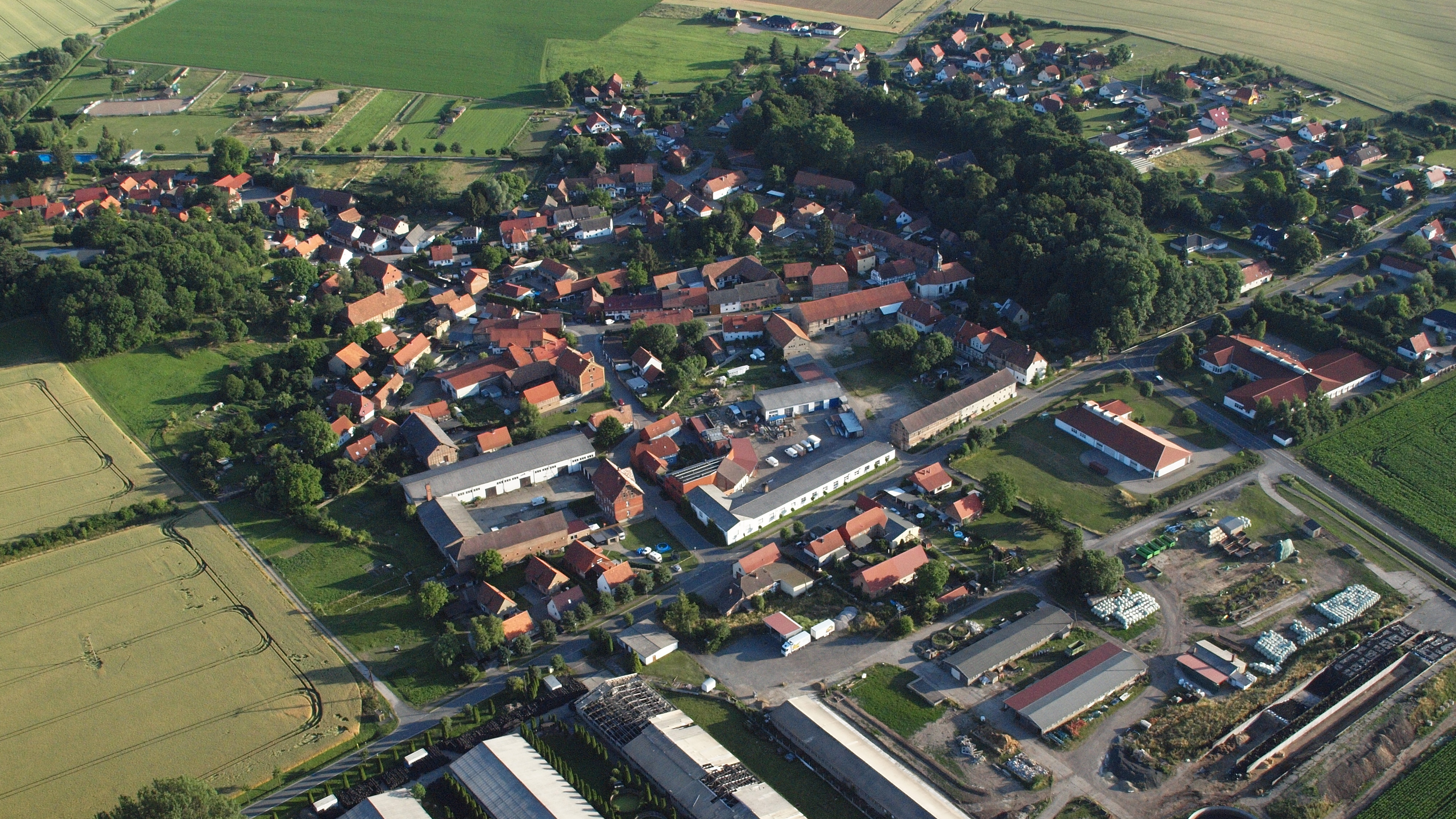 Schauen, Luftaufnahme (2015)